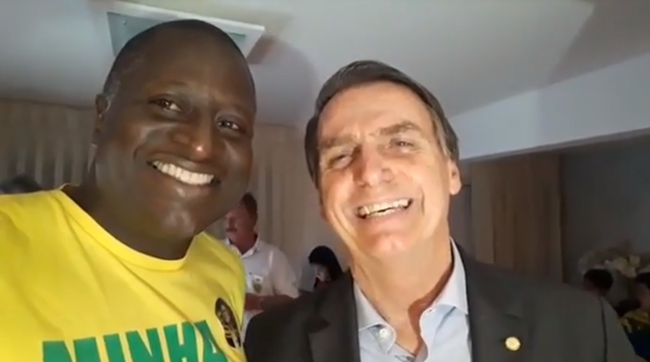 COMEMORAÇÃO EM SANTOS DA VITÓRIA DE JAIR BOLSONARO NAS ELEIÇÕES 2018